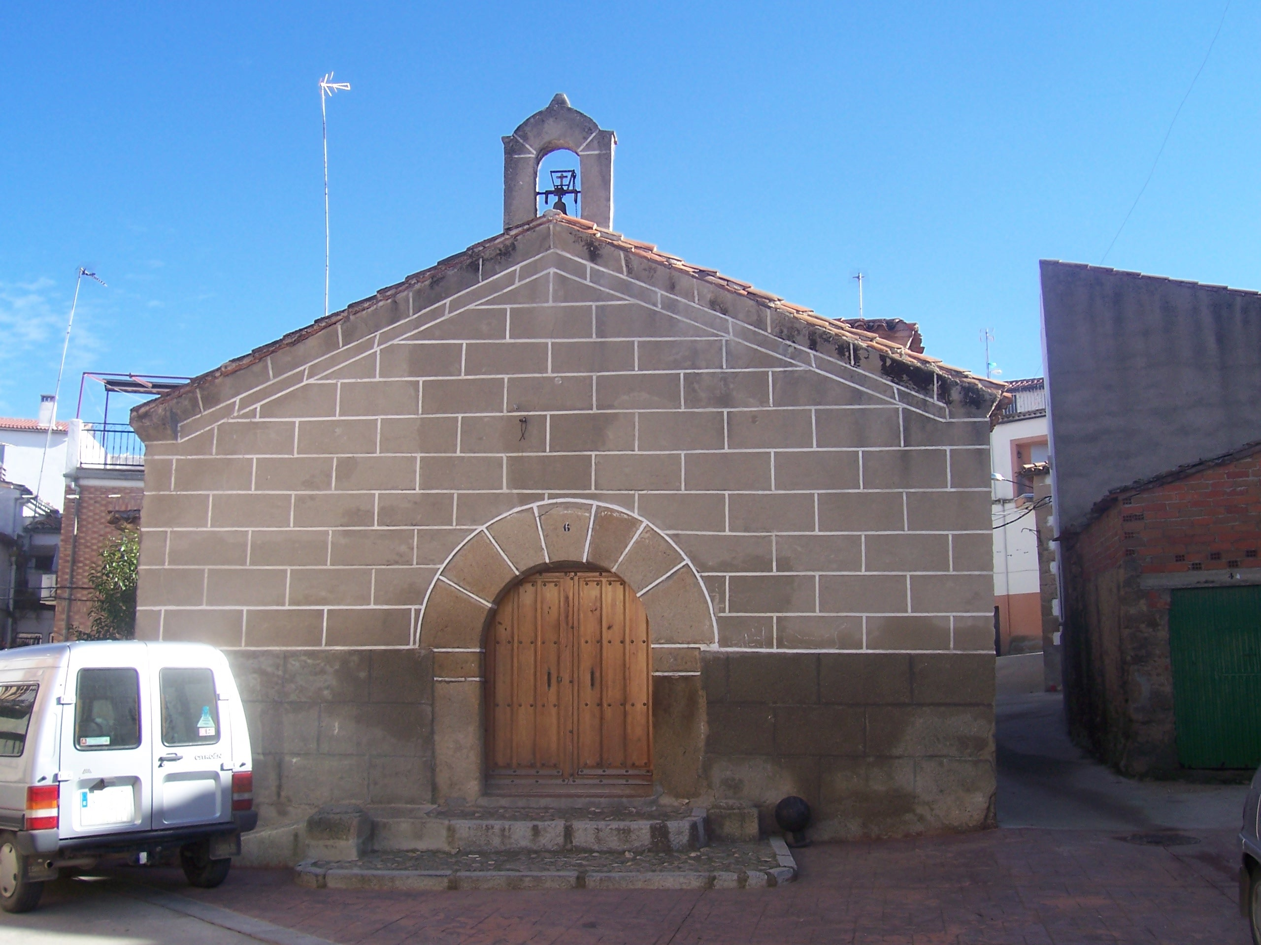 Ermita del Cristo del Amparo (Valdeobispo, Cáceres, España)